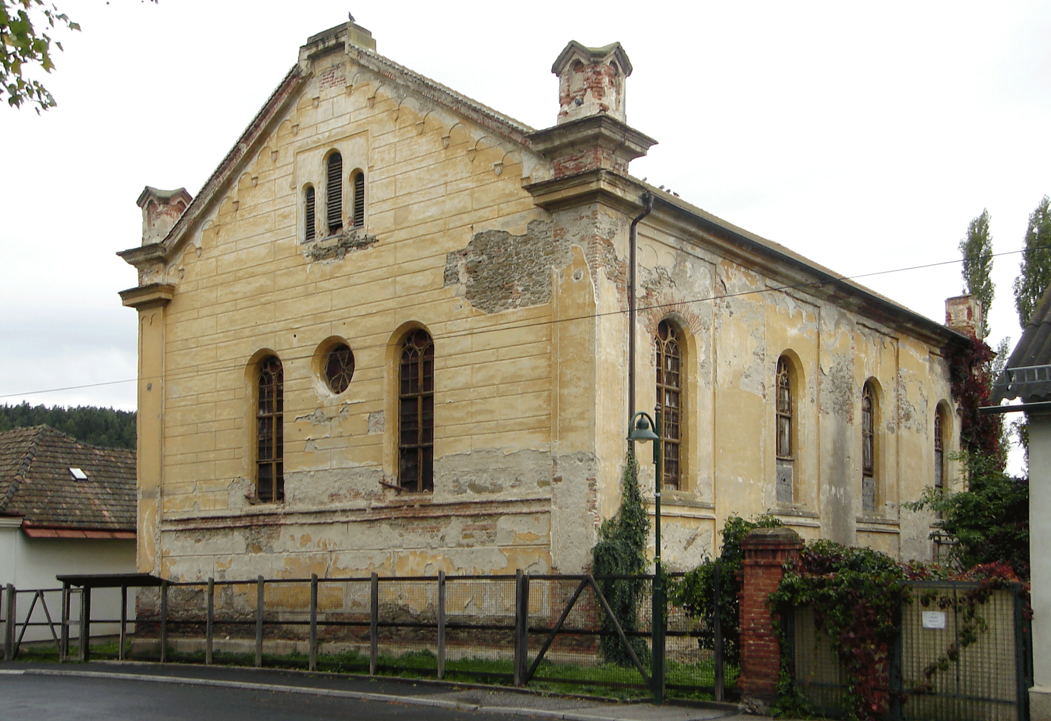 Kobersdorf, ehemalige Synagoge im Oktober 2006